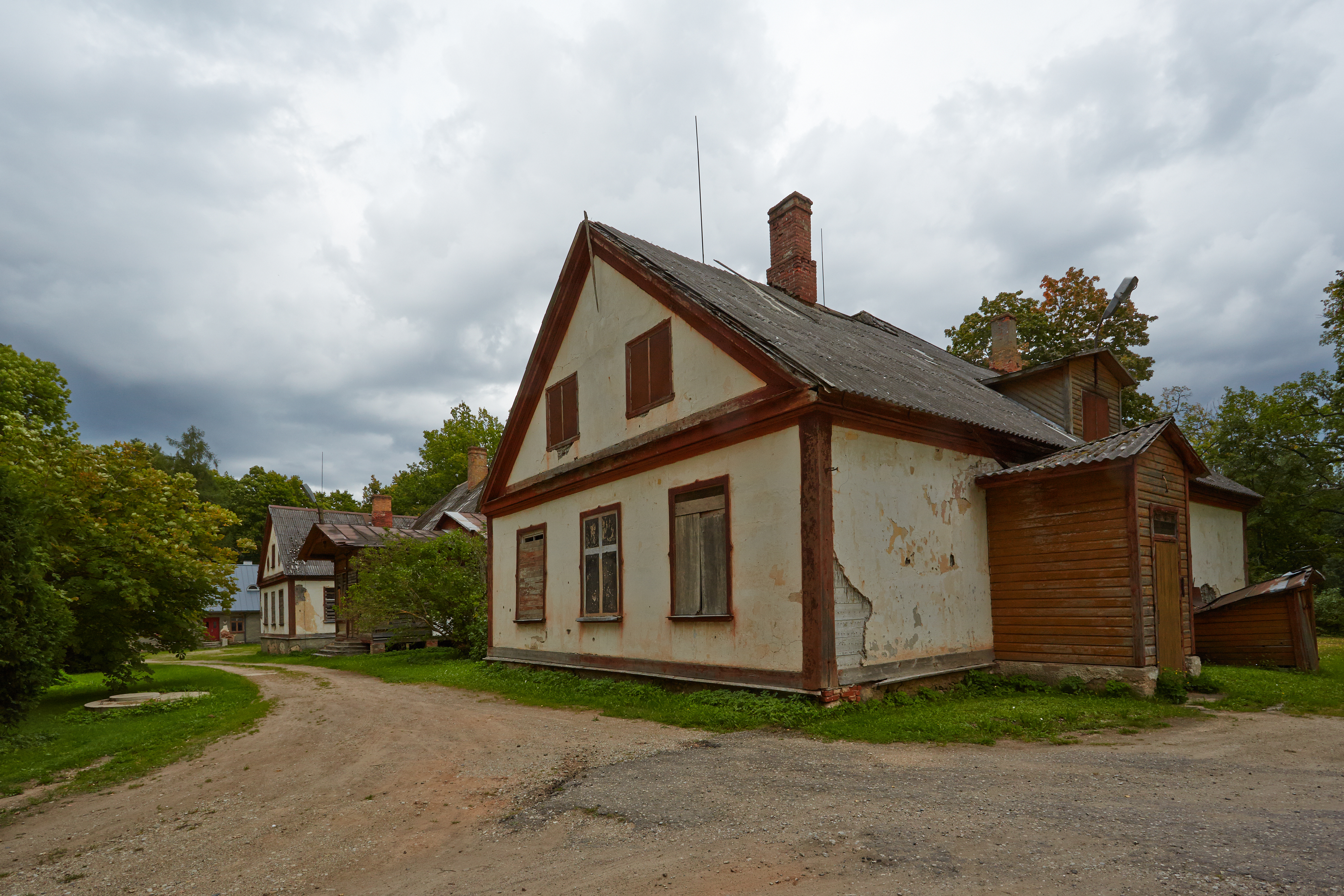 Tilsi mõisa peahoone eestvaade 2013. aasta augustis.